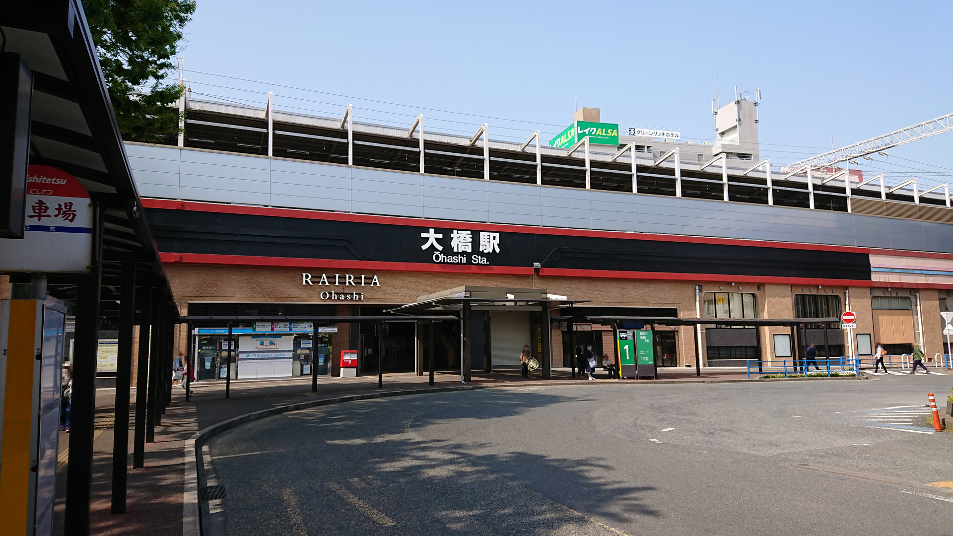 レイリア大橋リニューアル後